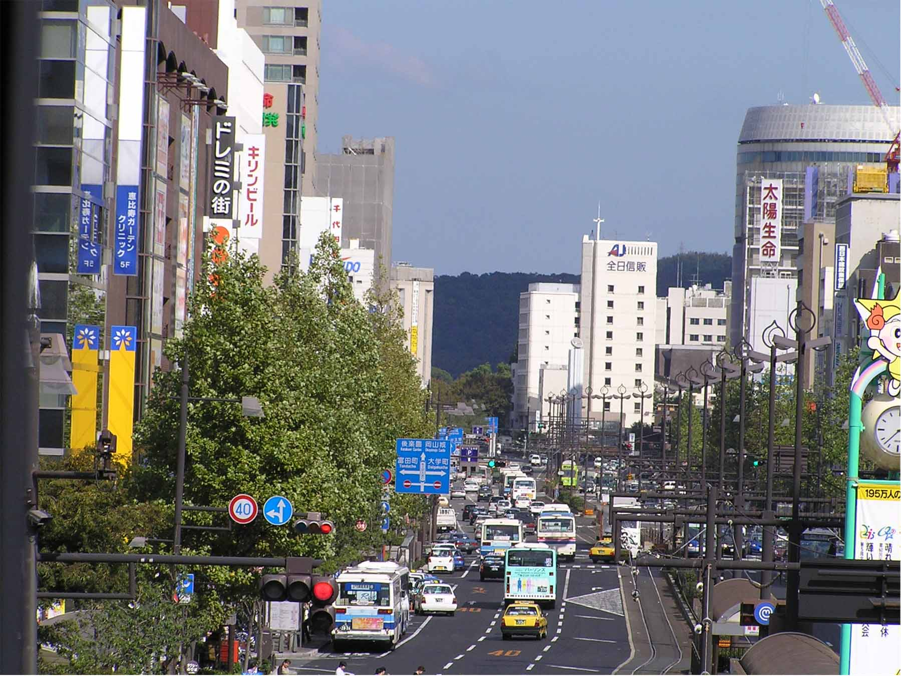 momotaro street